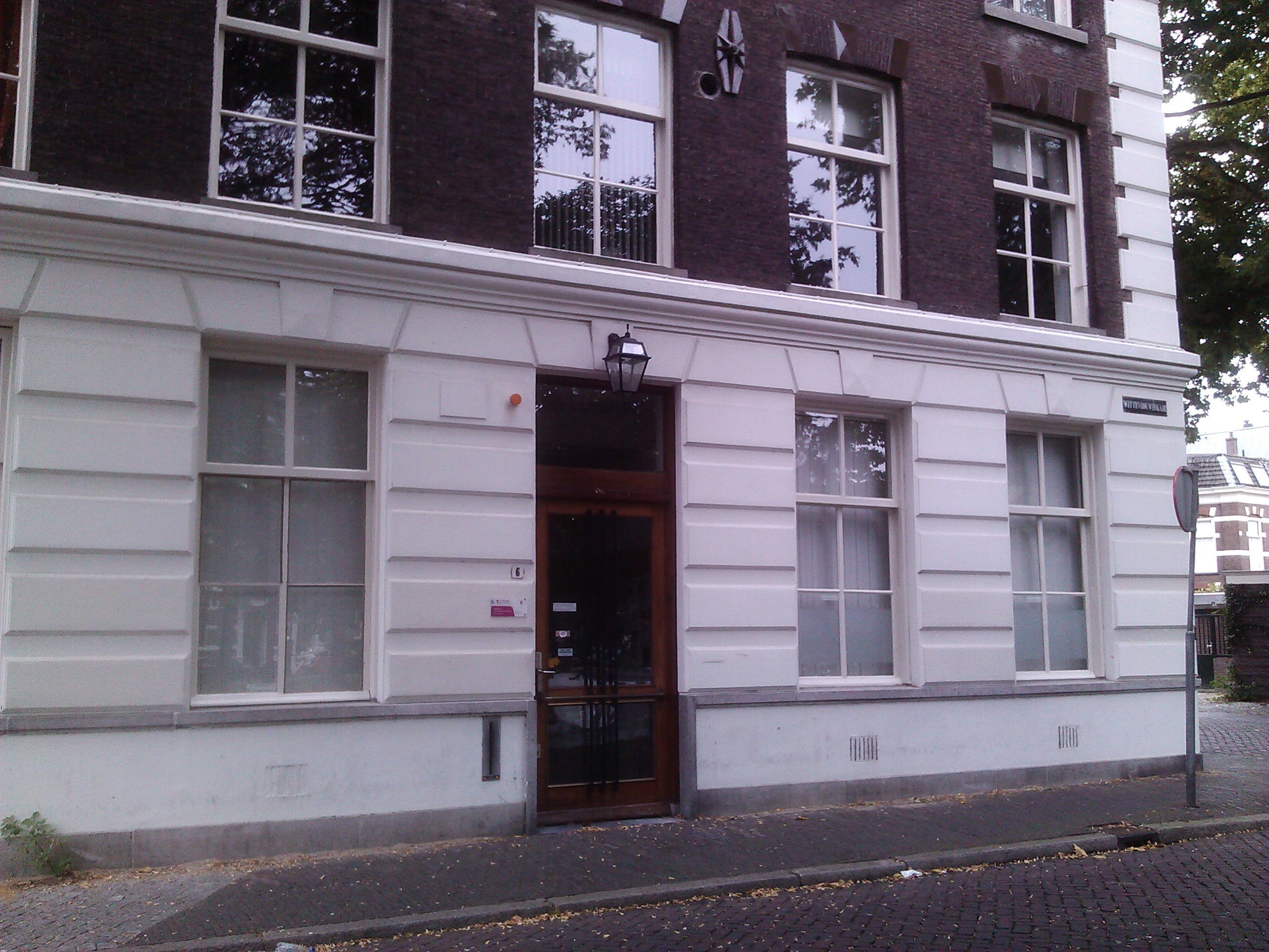 Rechterhoekpaviljoen van de Willemskazerne Wittevrouwenkade 6